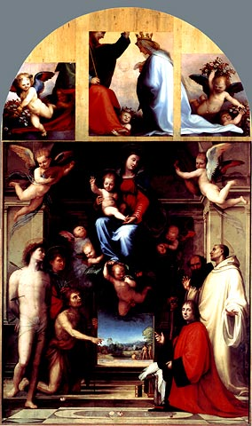 La Vierge aux saints de Fra Bartolomeo, actuellement à la cathédrale de Besançon, avec les fragments de ça lunette peinte par Mariotto Albertinelli, conservé actuellement à la Staatsgalerie de Stuttgart.